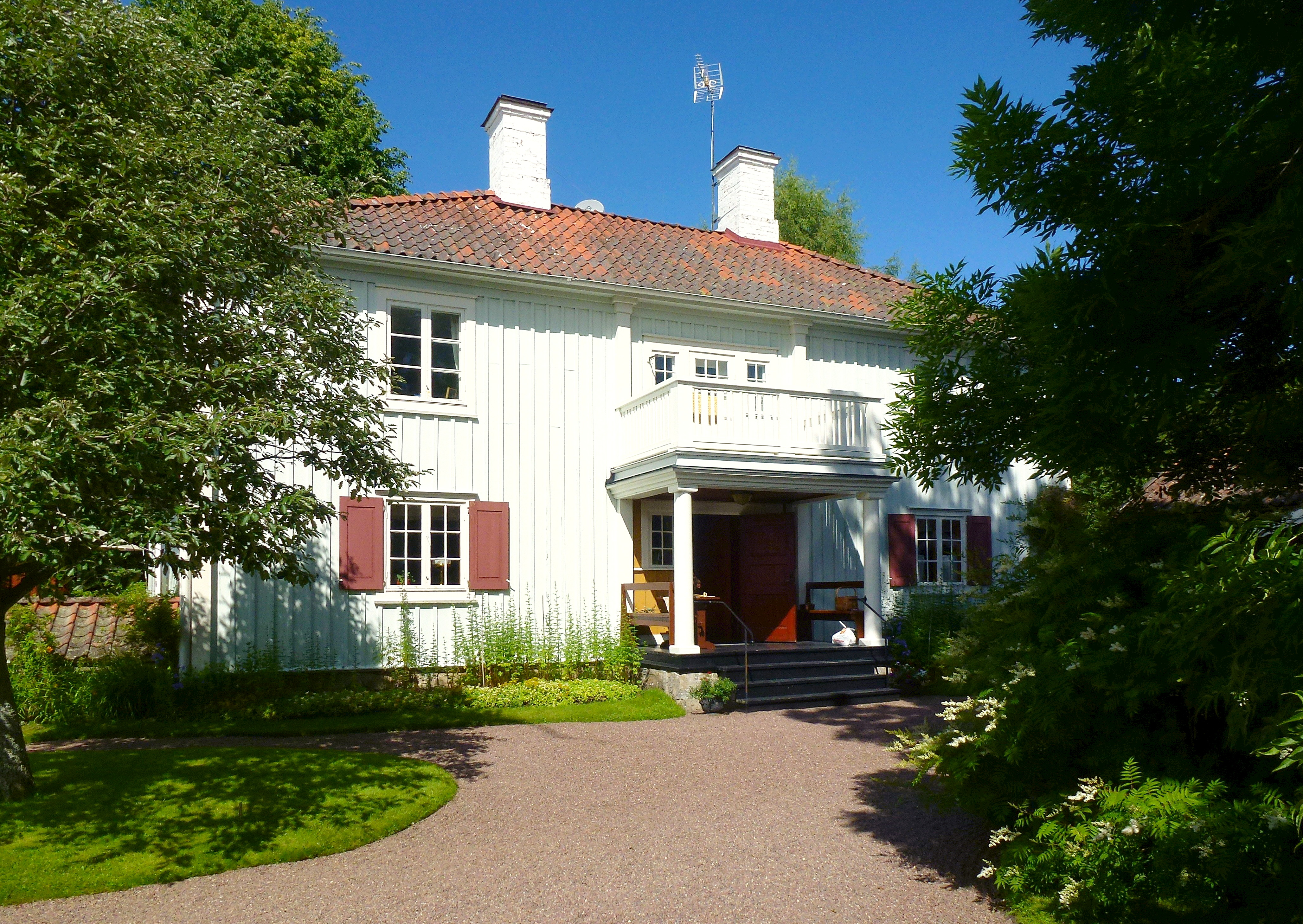 Karlfeldtsgården Sångs i Sjuagre, huvudbyggnaden